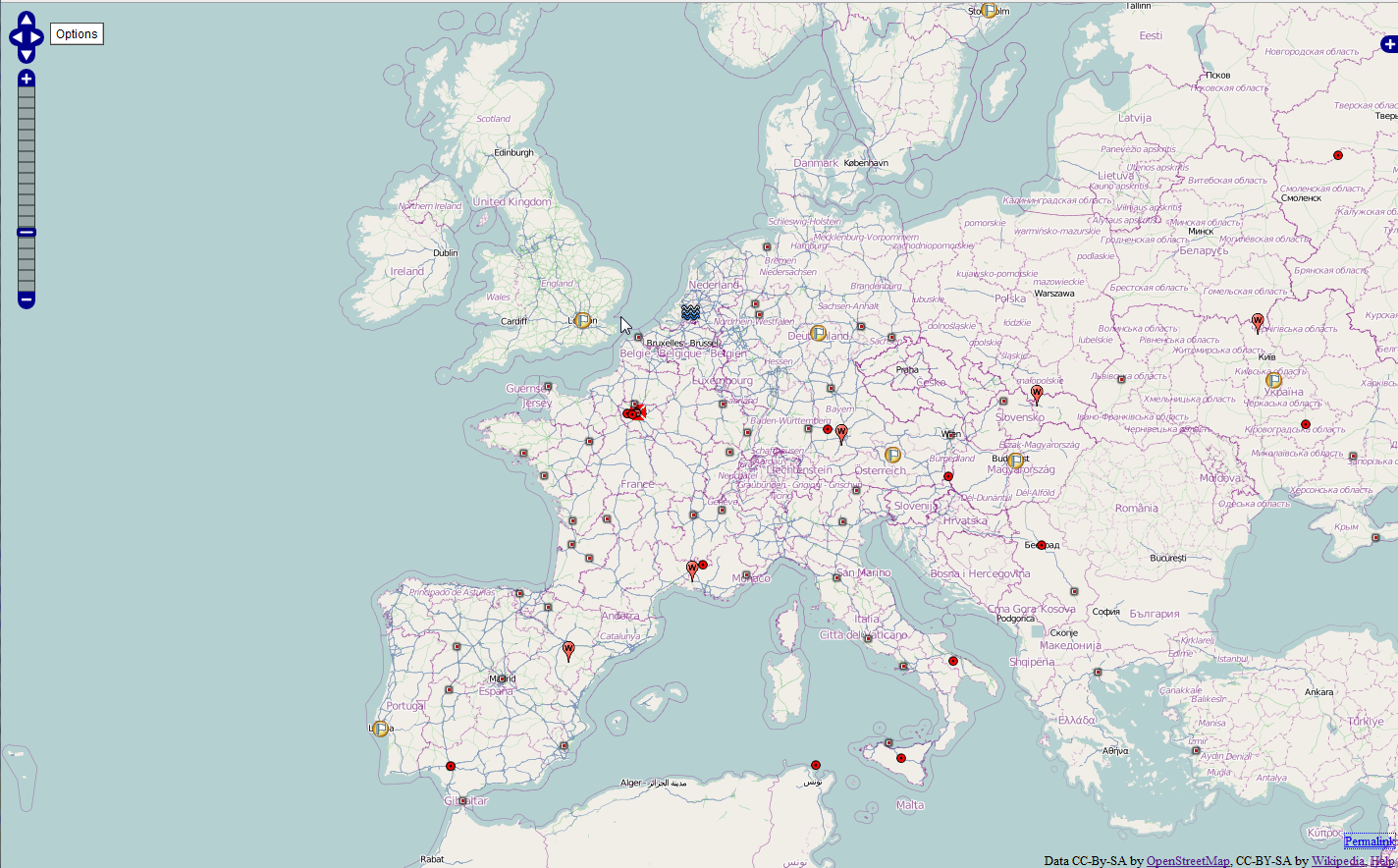 OSM-Gadget: WP-Screenshot um OSM-Gadget freizuschalten